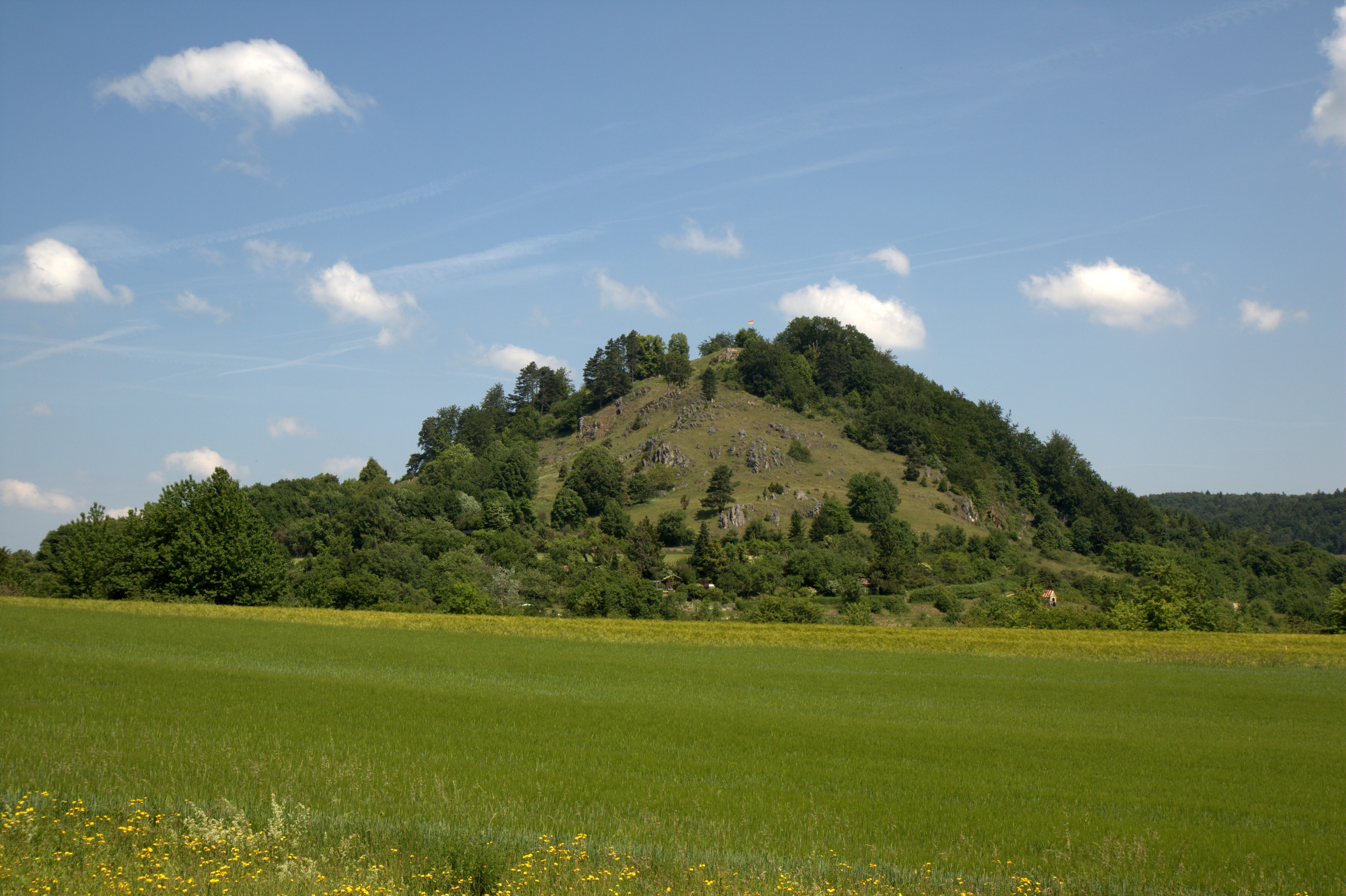 Burgruine Velburg - Ansicht des Schlossberges aus südlicher Richtung